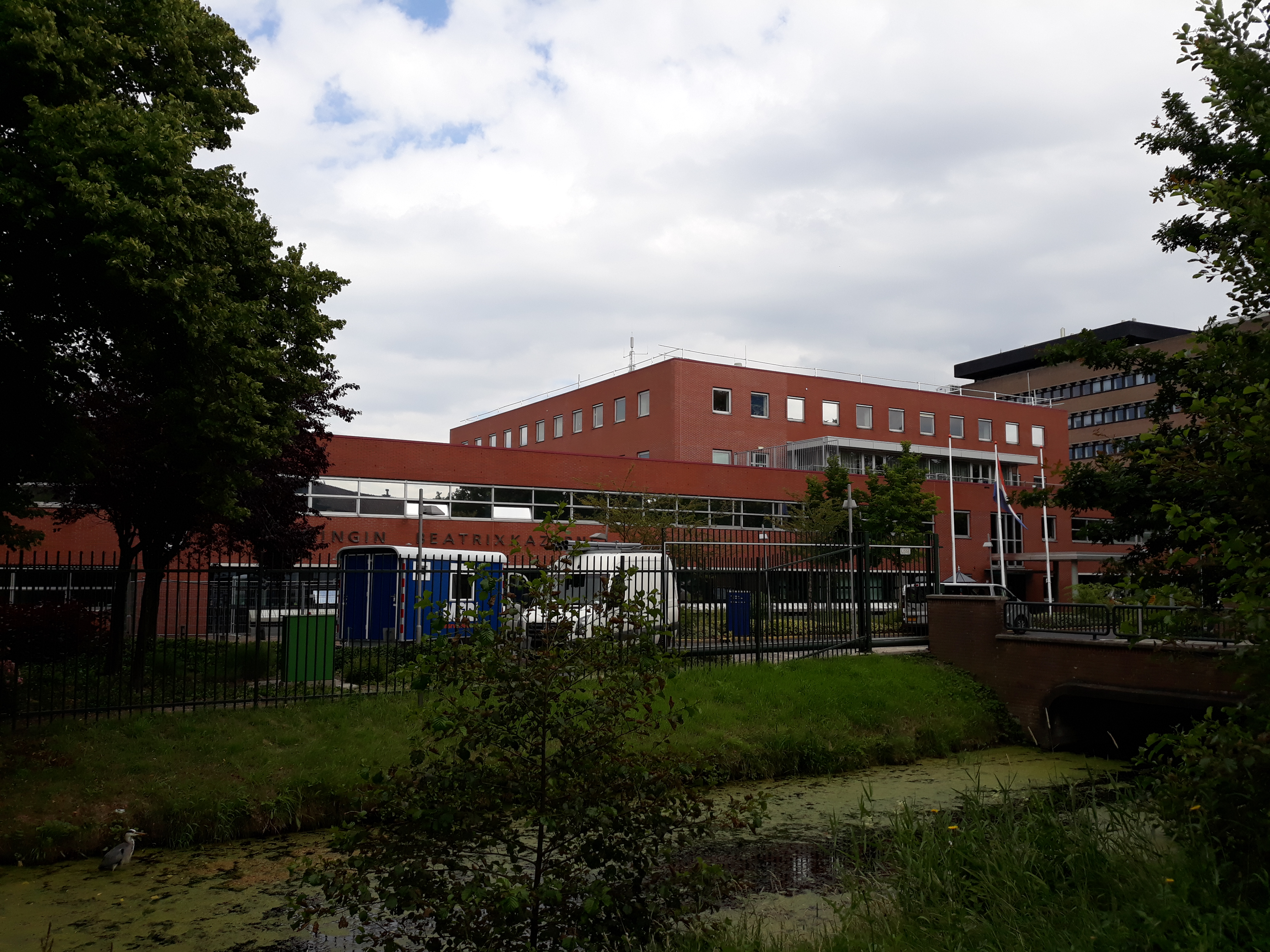 Die Beatrixkazerne der niederländischen Armee in Den Haag.